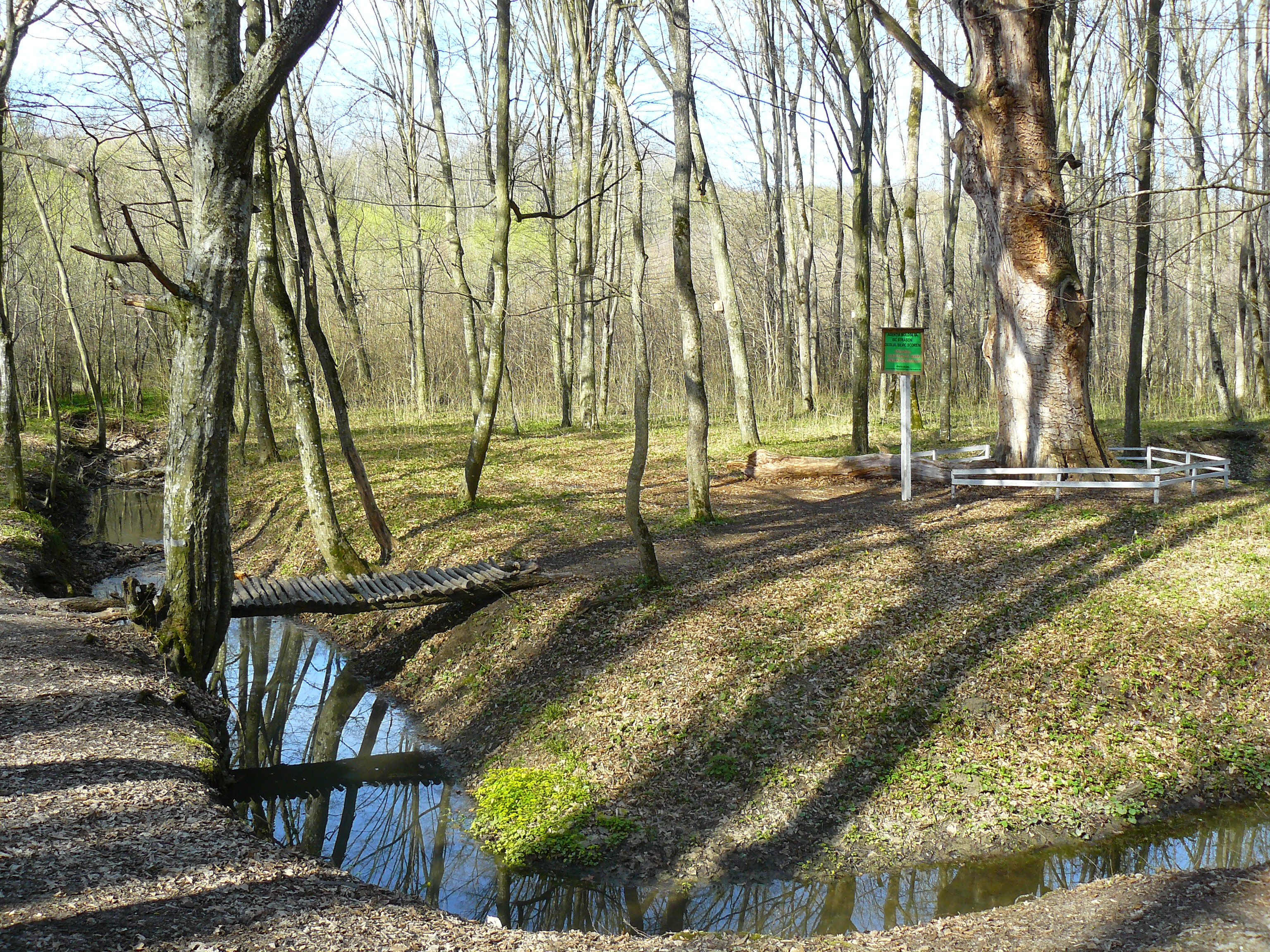 Cb-100